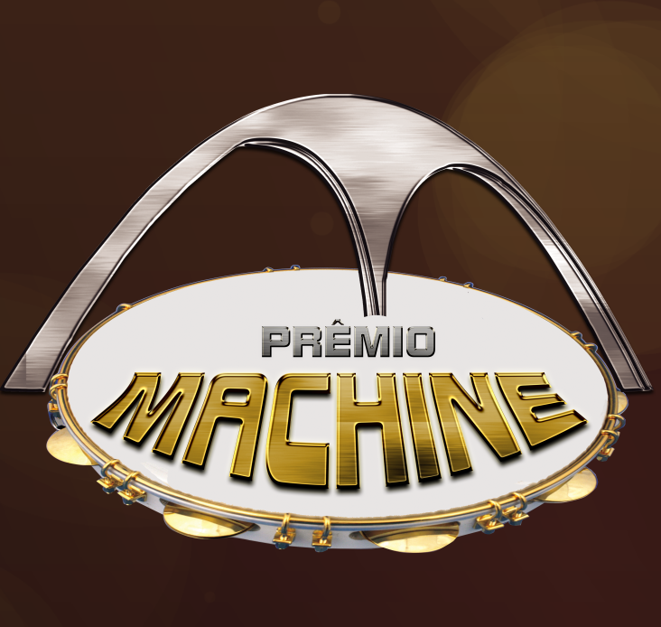 Imagem do Logotipo do Prêmio Machine - Bastidores do Carnaval Carioca